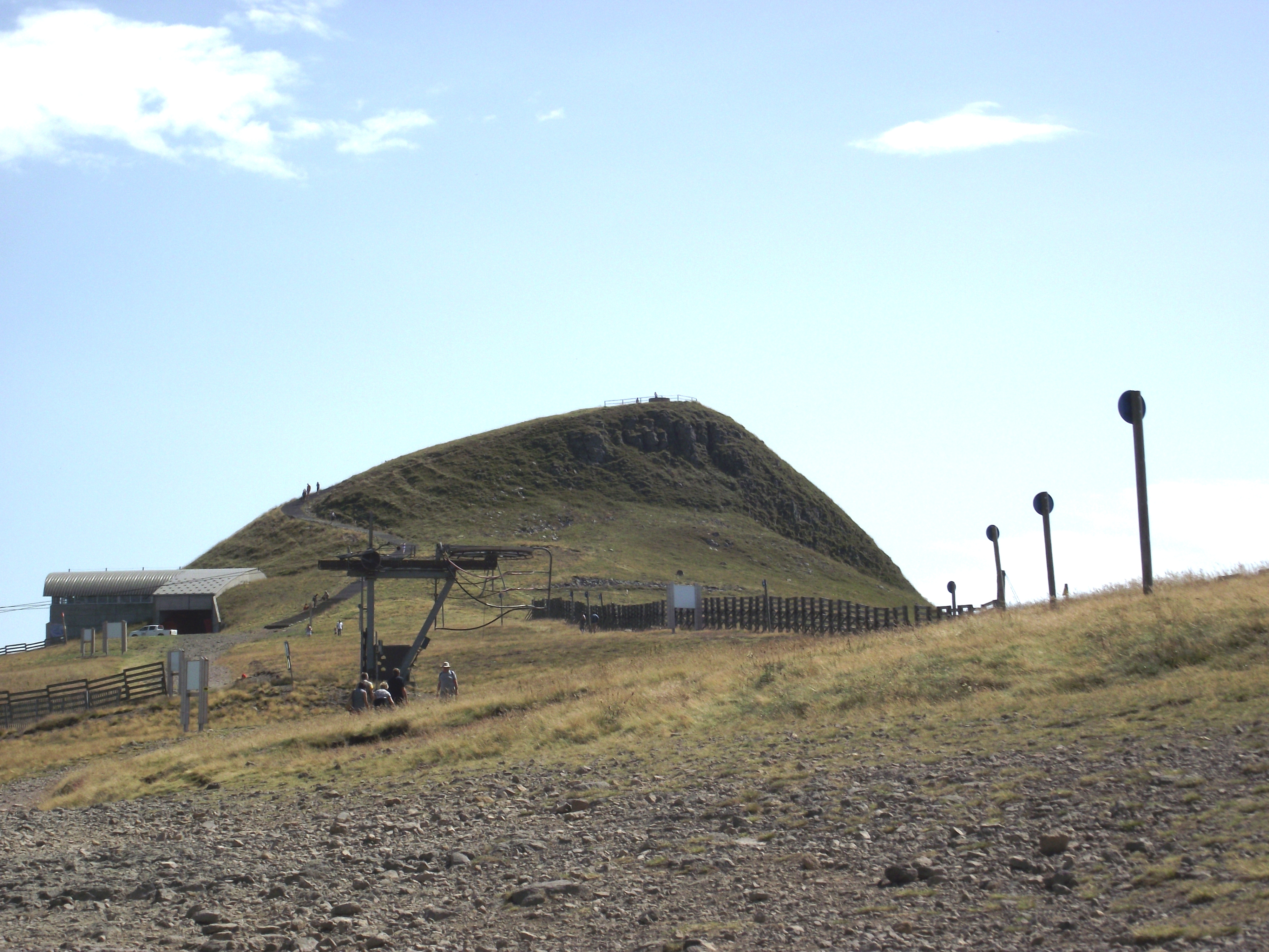 Le sommet du Plomb du Cantal (1855 m). Culot de basanite surmontant des brèches andésitiques.